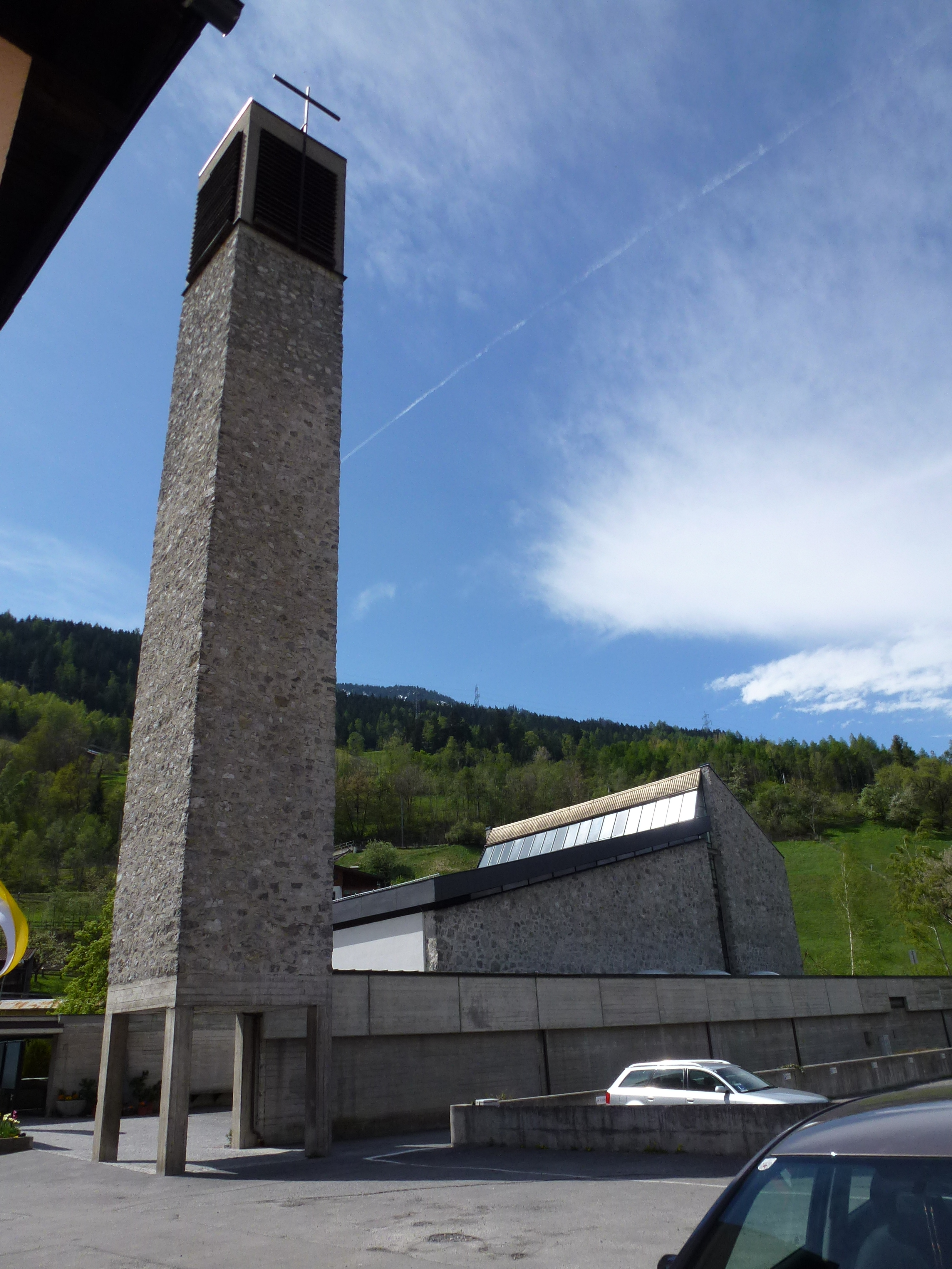 Kath. Pfarrkirche hl. Josef Opifex - Bruggfeldstraße 33, Landeck